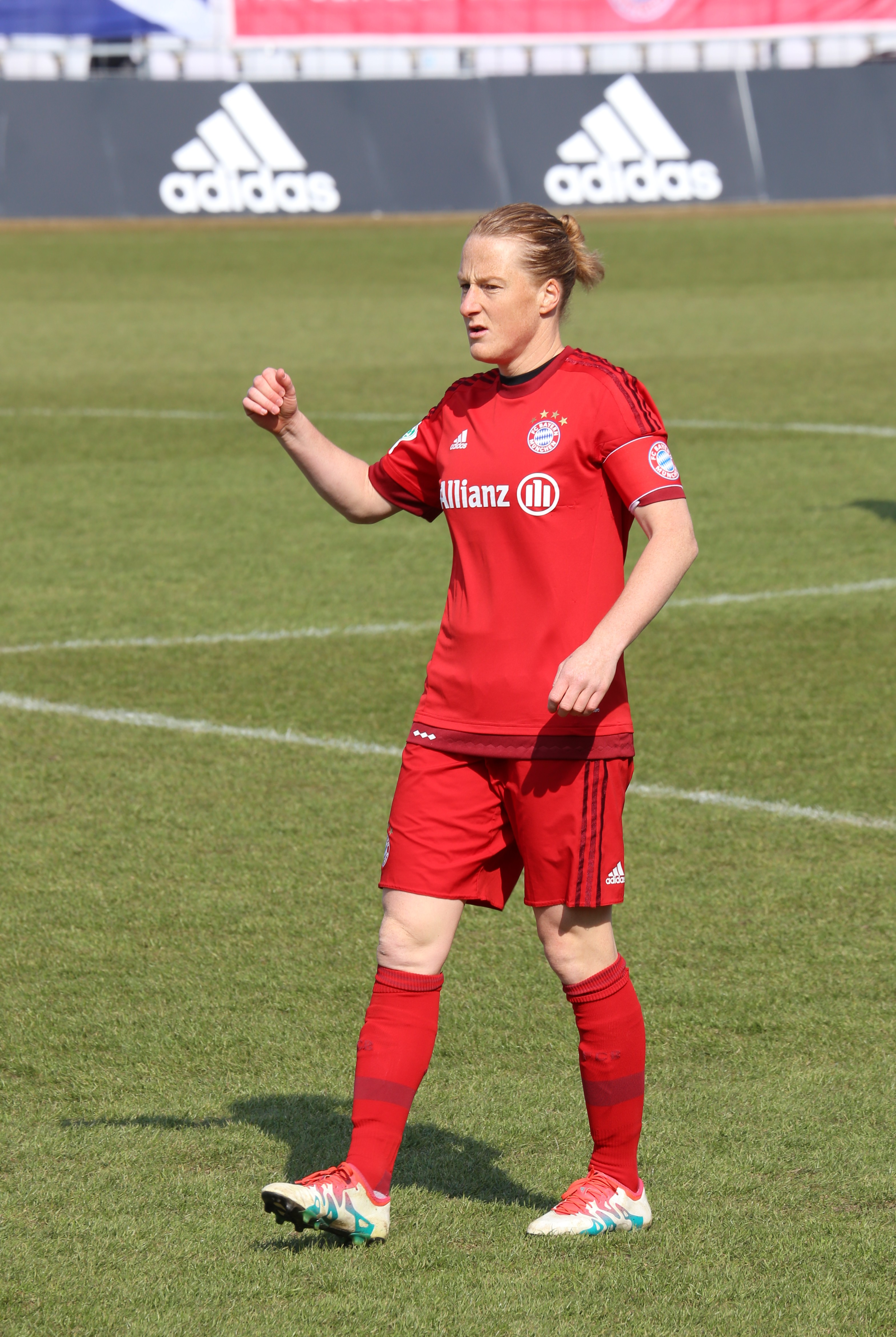 Melanie Behringer (FC Bayern München) beim Frauen-Bundesliga-Spiel FC Bayern München gegen FF USV Jena am 19. März 2016 im Stadion an der Grünwalder Straße (Ergebnis war 5:1).